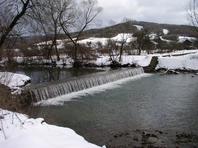 Vodný tok Výrava, Rokytov pri Humennom